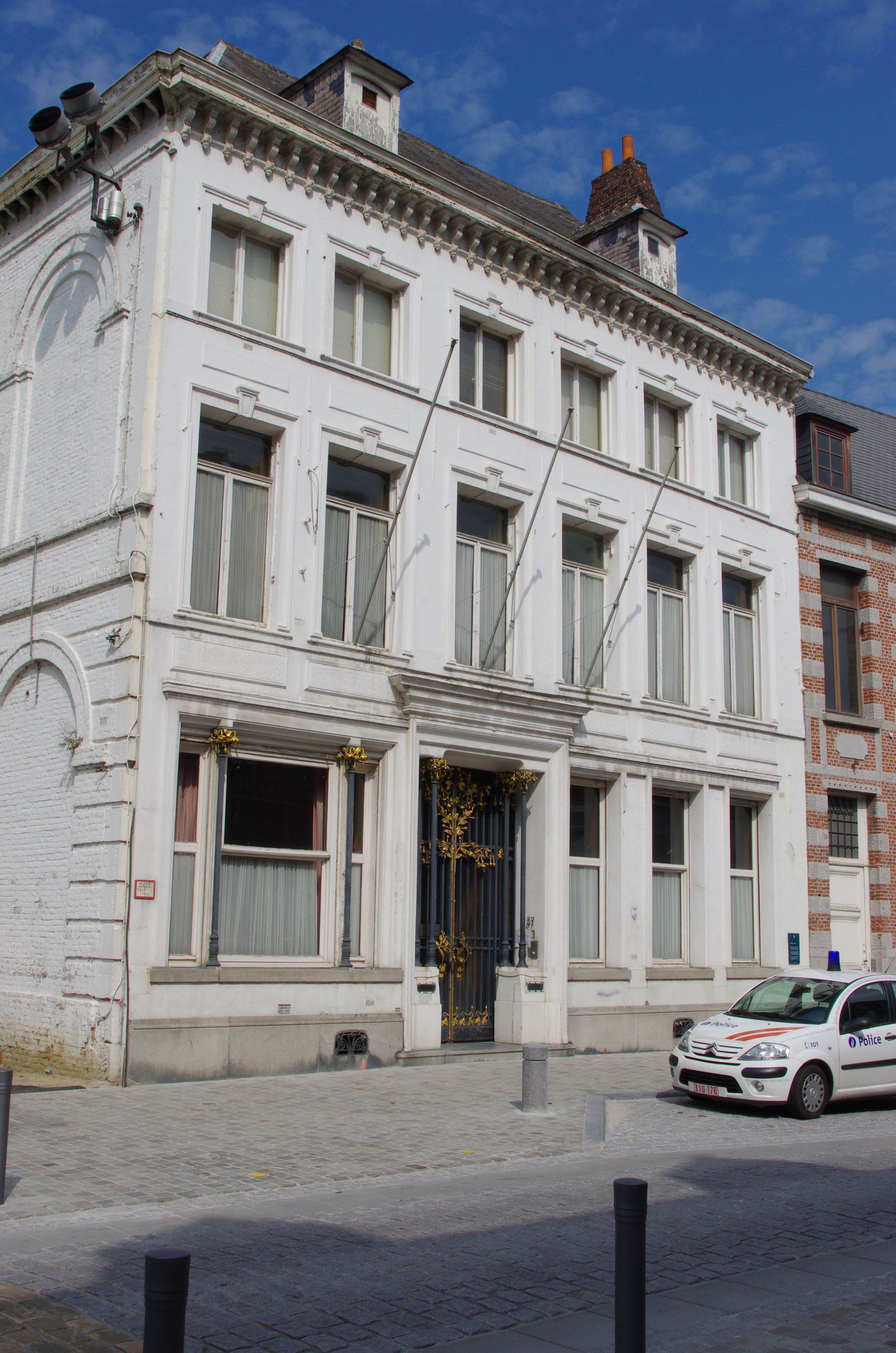 Façades et toitures de la maison Losseau, Rue de Nimy, n° 37